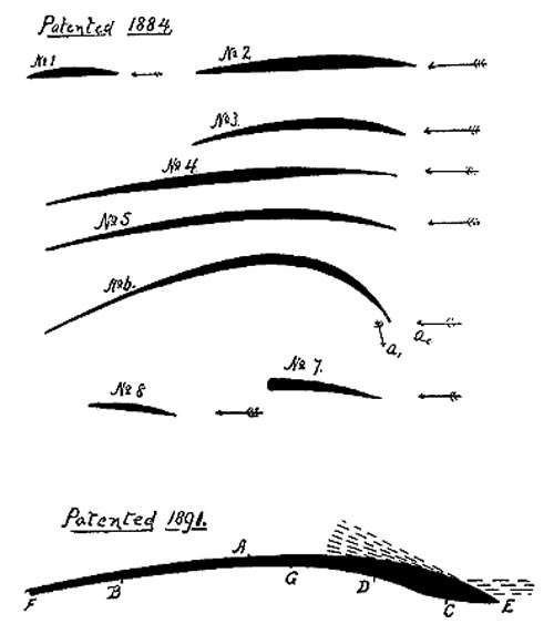 Tragflächenprofile Auszug aus Patent von Horatio Frederick Phillips